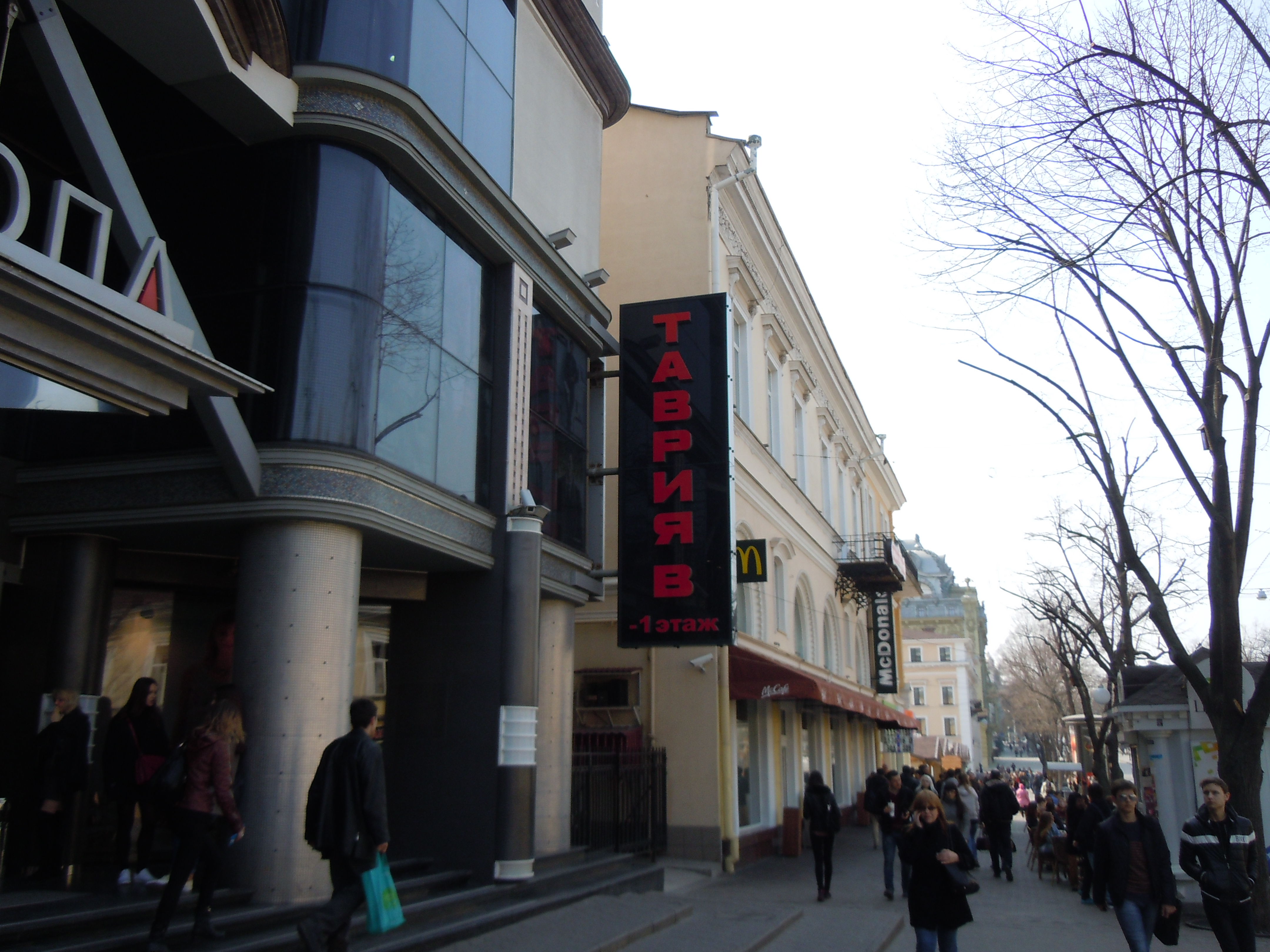 Супермаркет "Таврія В" на Дерібасівській, Одеса